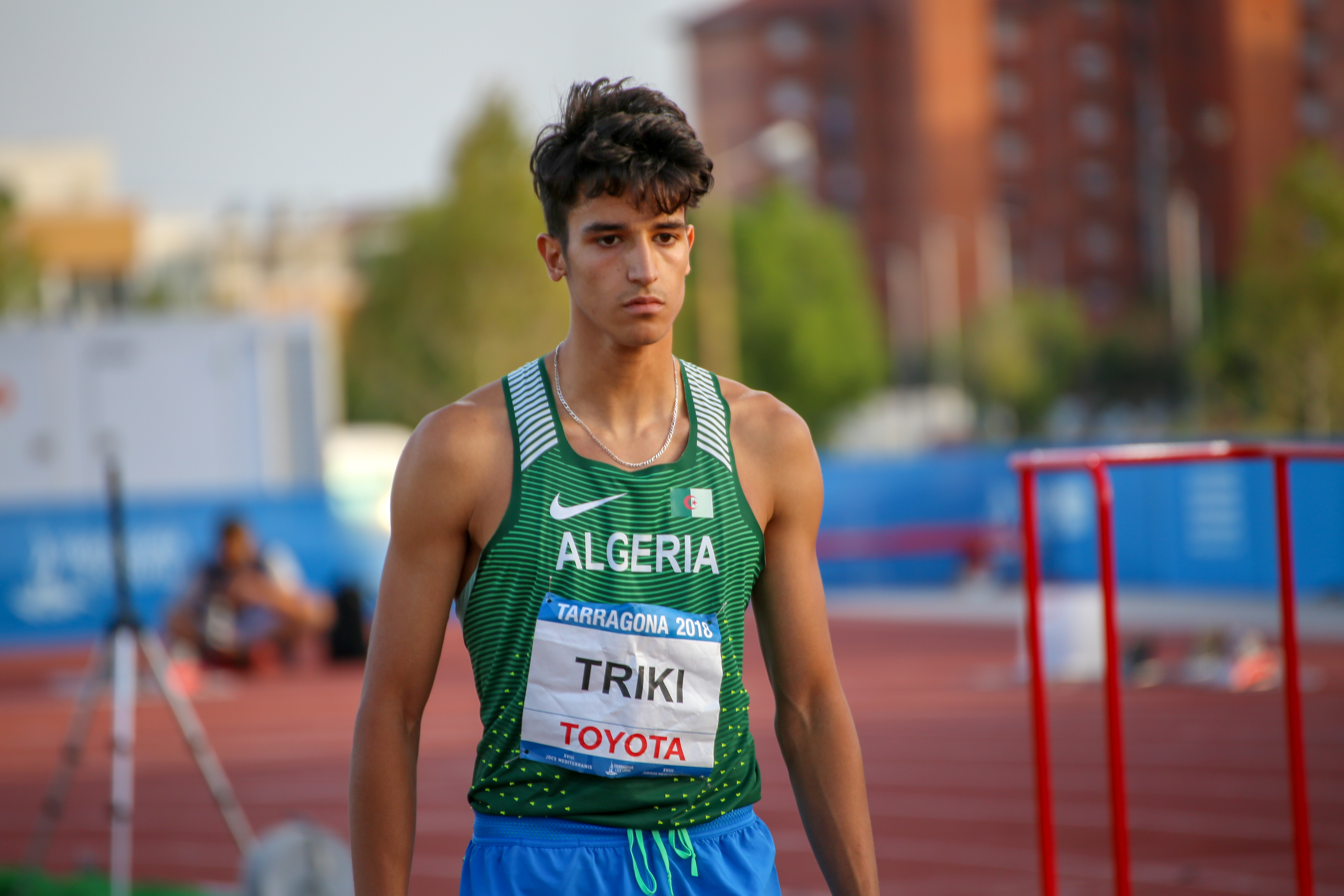 Yasser Triki en el salto de longitud de los Juegos del Mediterráneo 2018